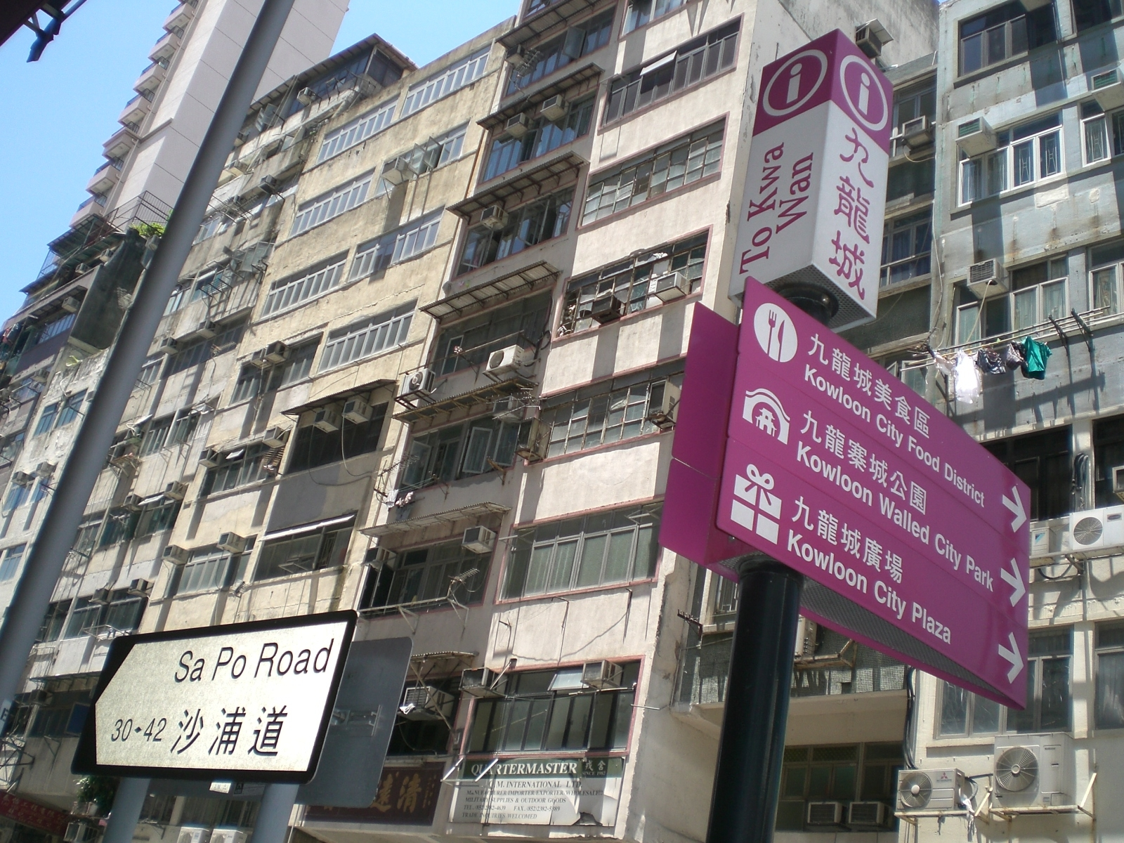 九龍城區沙浦道